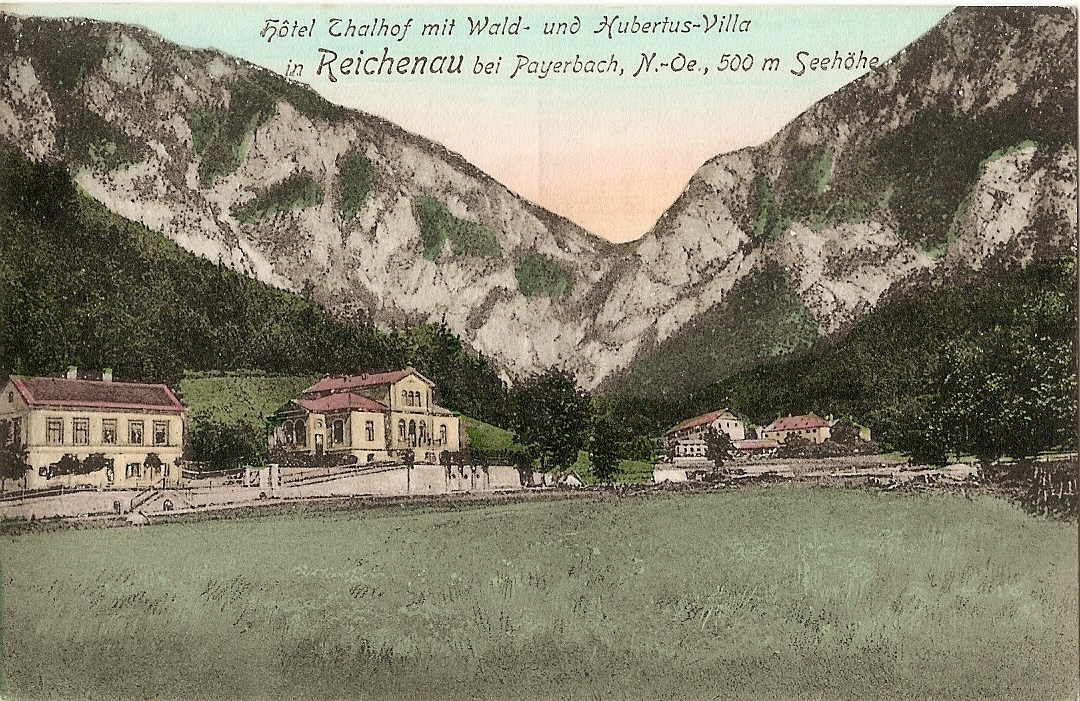 Reichenau Thalhof Postkarte 1912